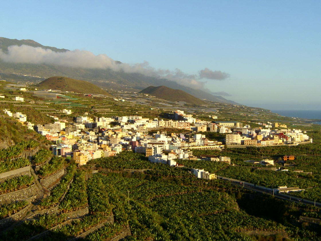 La Palma: Sicht auf Tazacorte